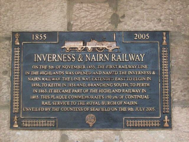 Plakette am Bahnhof Nairn zur Erinnerung an das 150jährige Bestehen der Bahnlinie zwischen Inverness und Nairn, Schottland.